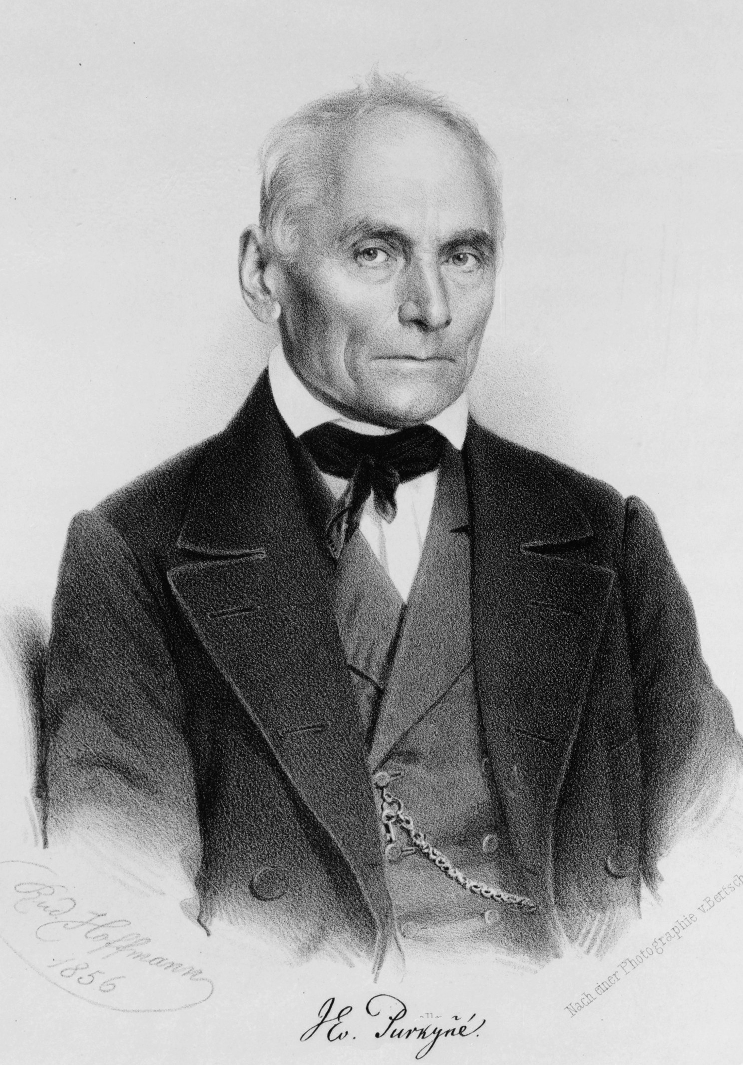 Czech anatomist Jan Evangelista Purkyně [1787-1869)